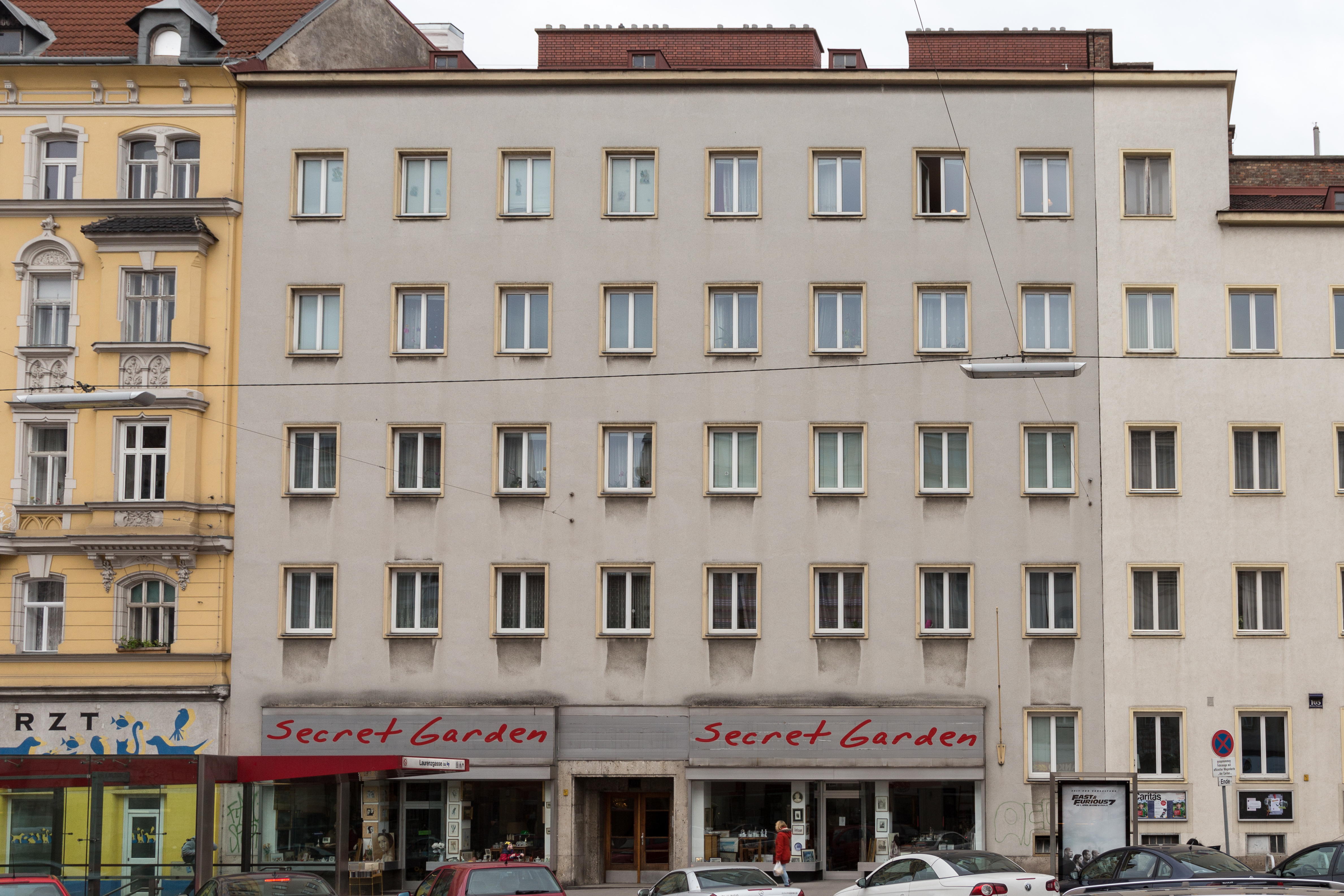 Wiedner Hauptstraße 103